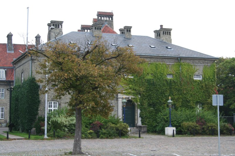 The jailhouse at Holmen in Copenhagen, Denmark